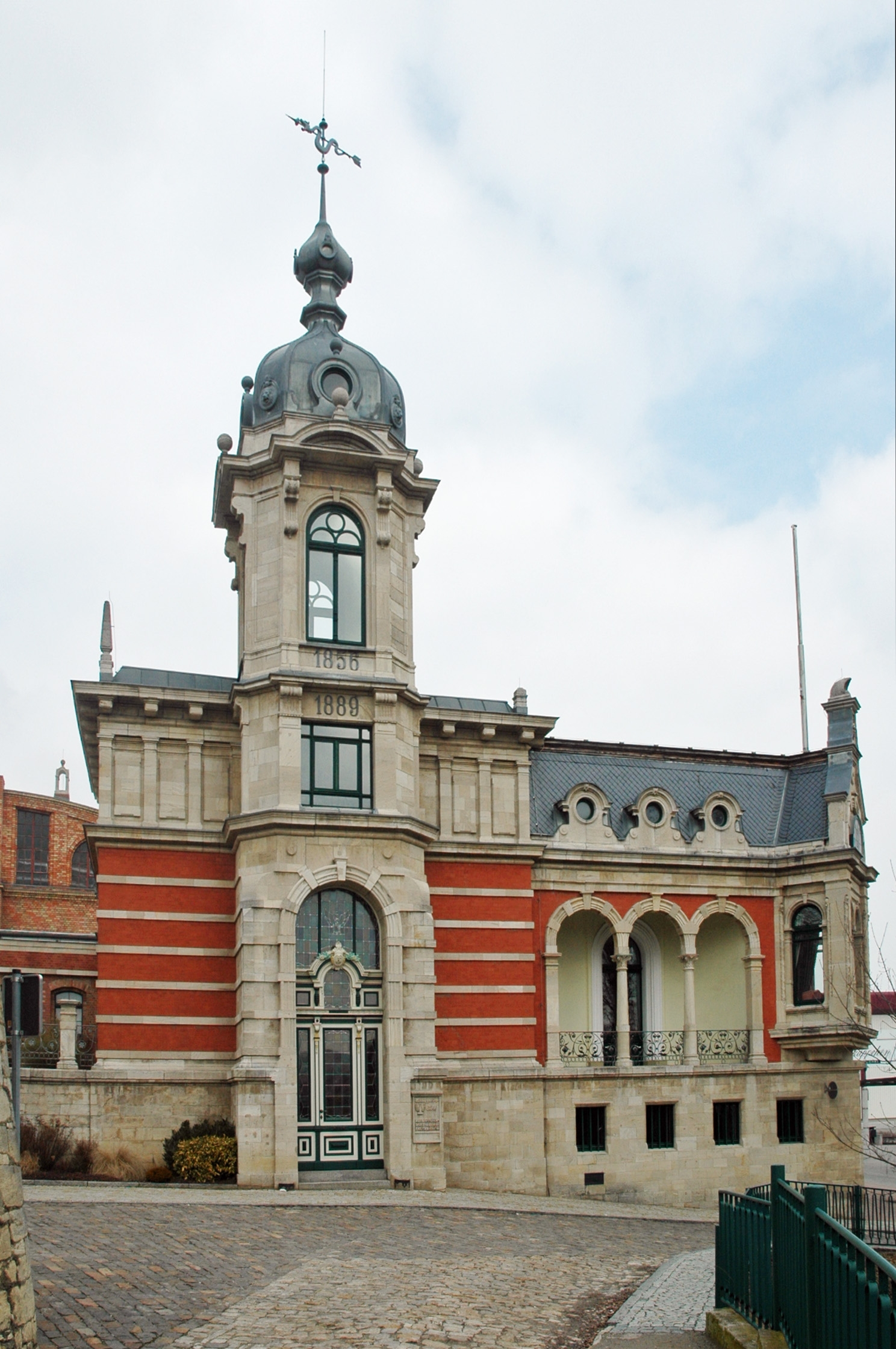 historisches Hauptgebäude der Rotkäppchen-Sektkellerei